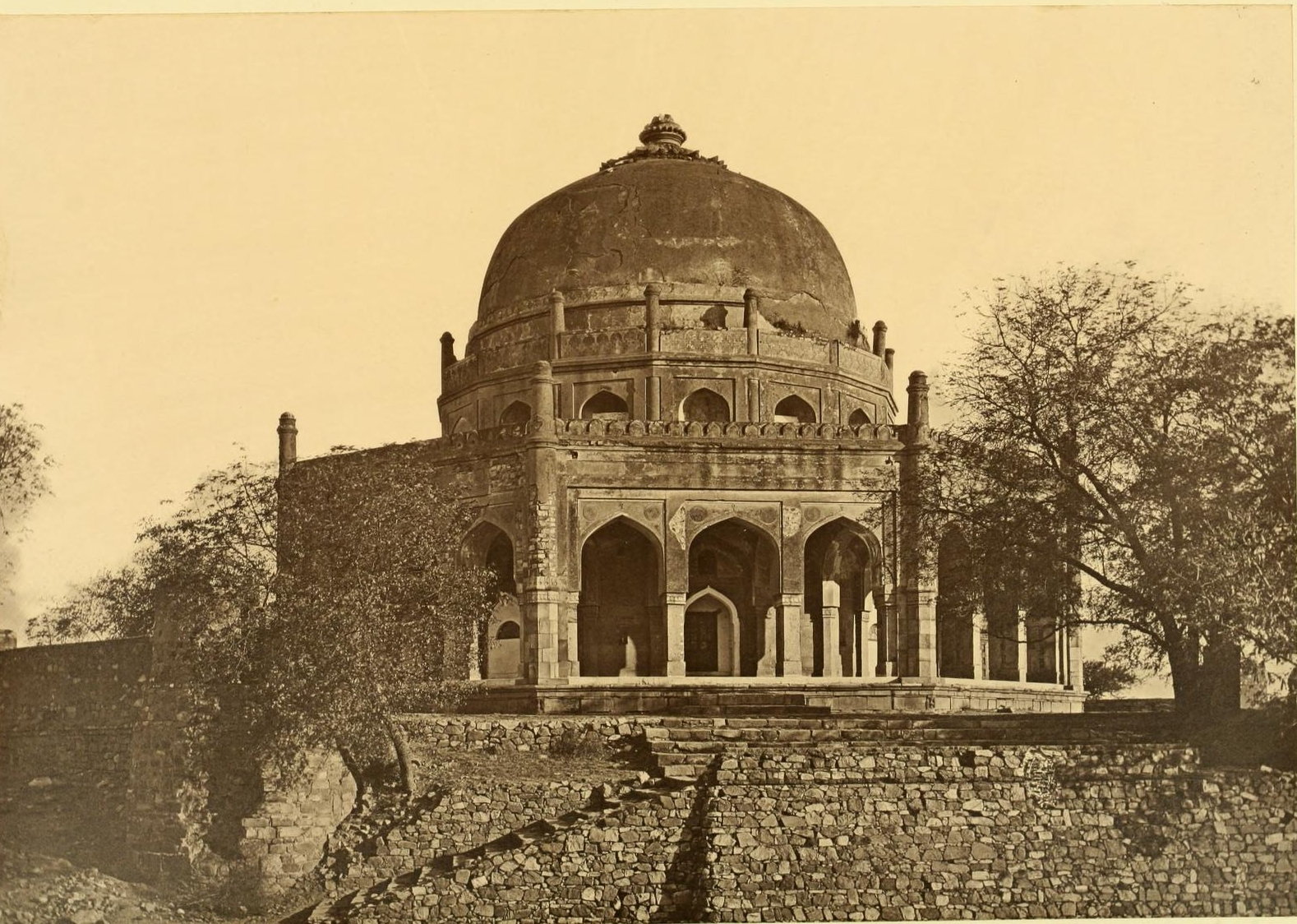 Imam Zamim's tomb